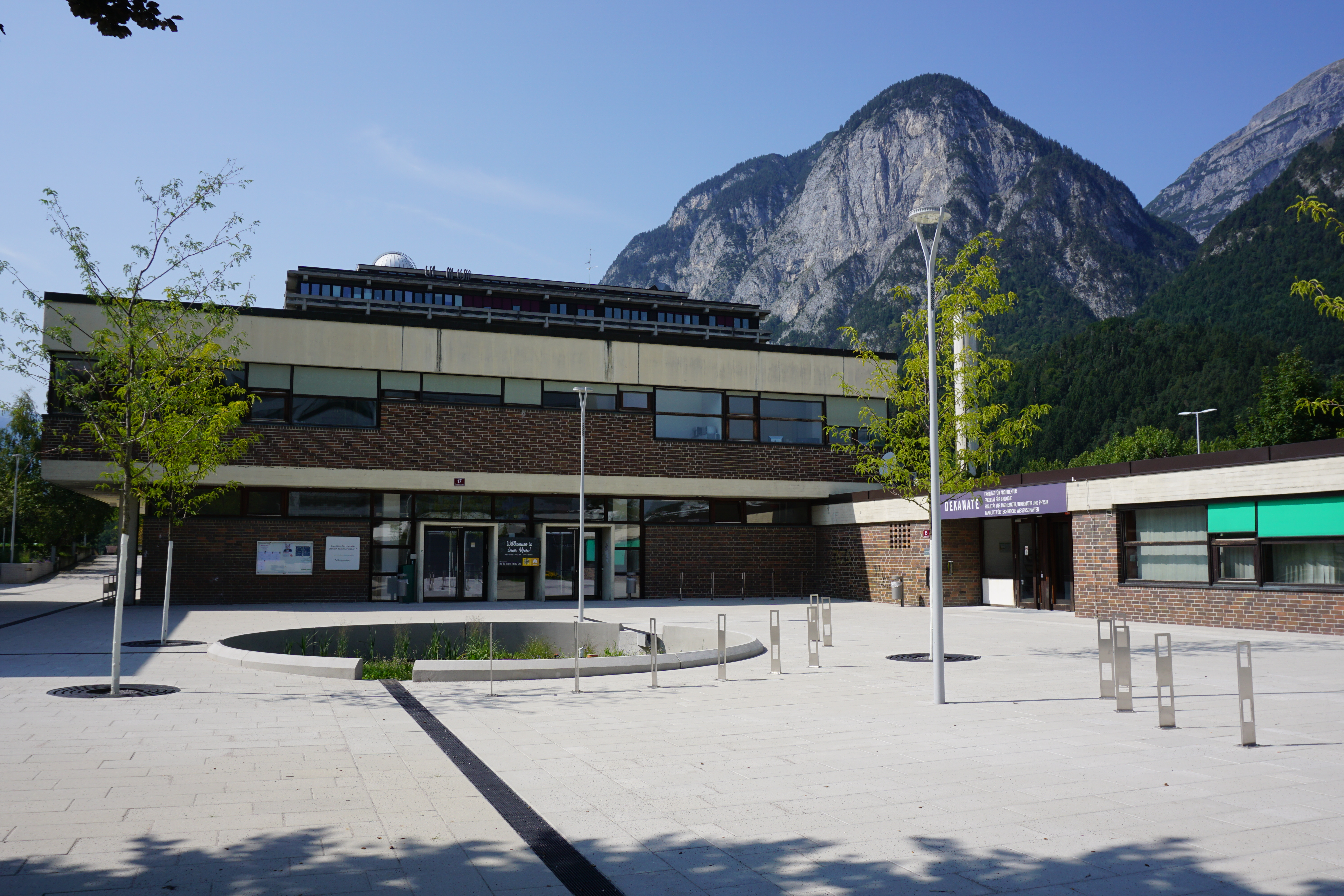 Campus Technik der Universität Innsbruck. Mensa, Dekanate